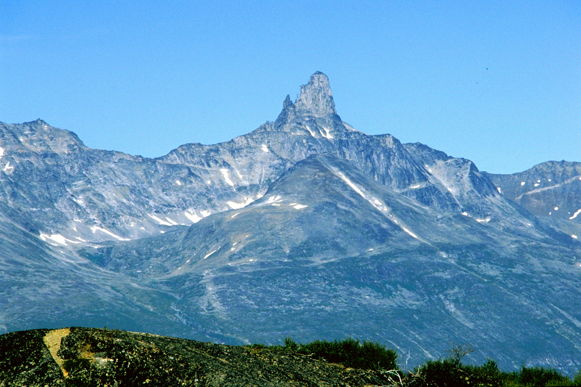 Kirkespiret S